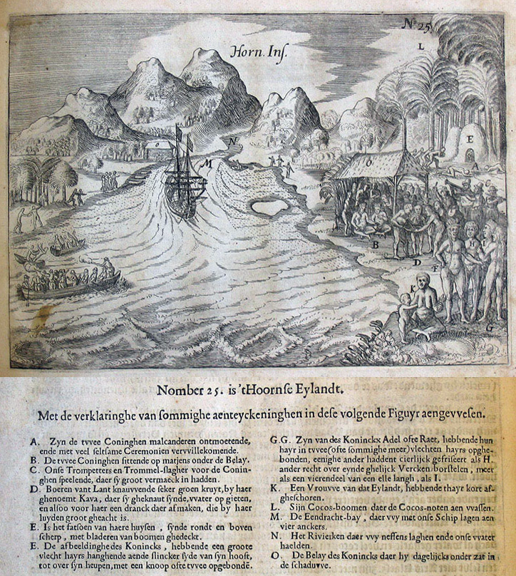 PD wegens ouderdom. Jacob le Maire overleden 1616